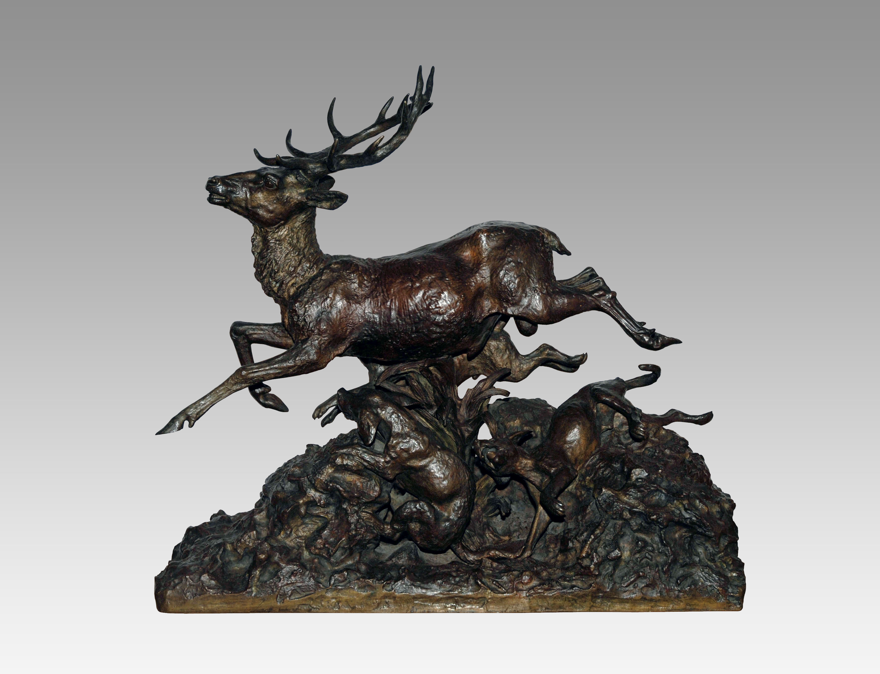 Fratin "Cerf sautant le marais (scène de chasse, groupe)" Bronze, signée de l'estampille "Fratin"